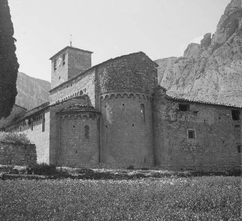 Imatge